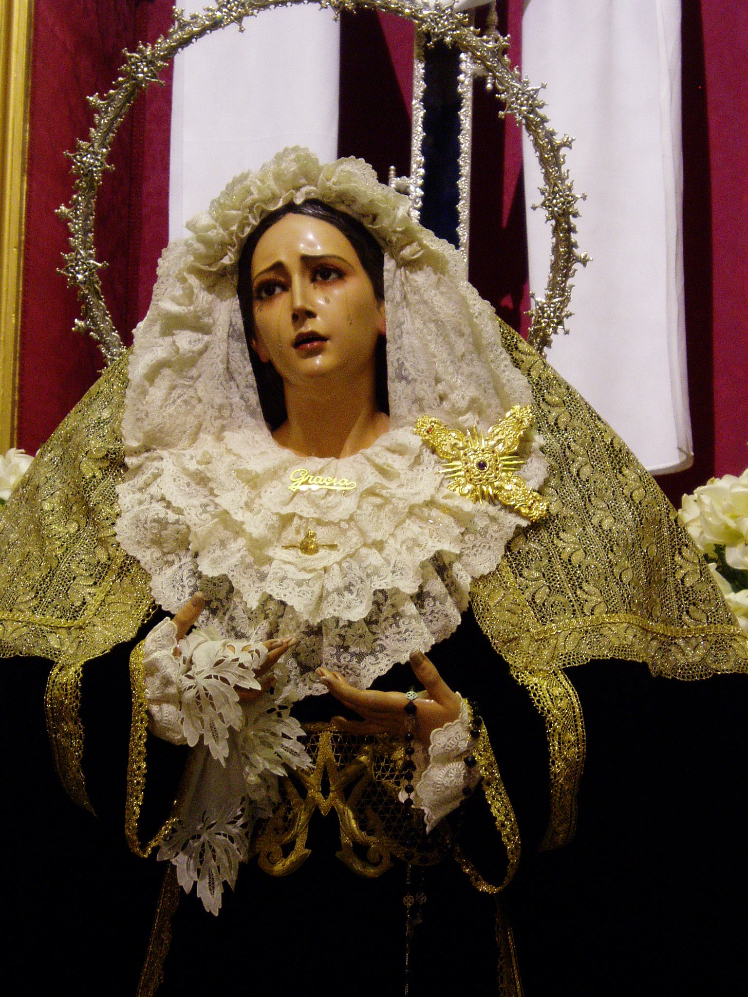 Foto de la Virgen de Gracia (Cofradia del Rescate, Malaga) en Viernes Santo.